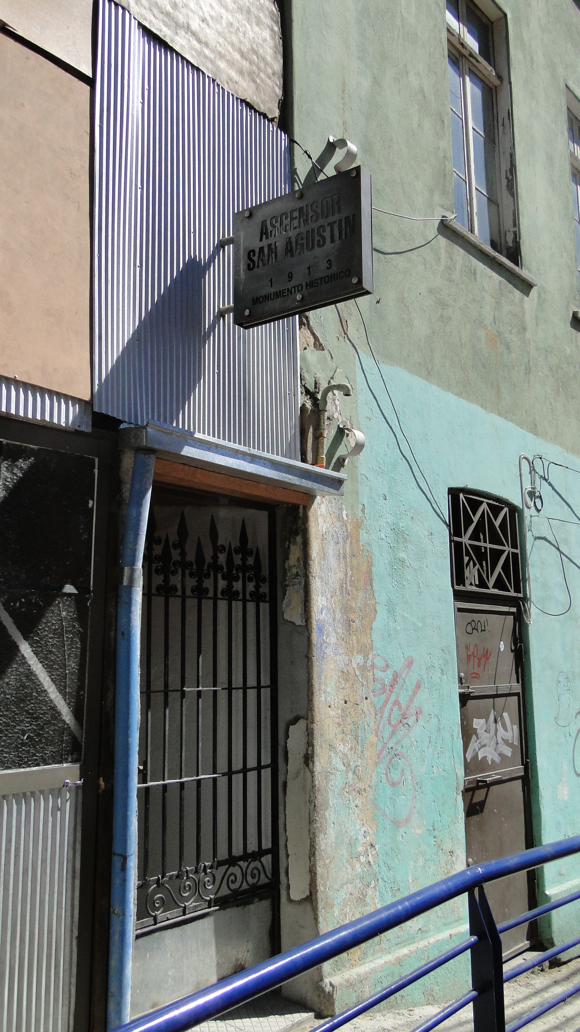 Ascensor San Agustín-Entrada por Tomás Ramos This is a photo of a national monument in Chile: 769